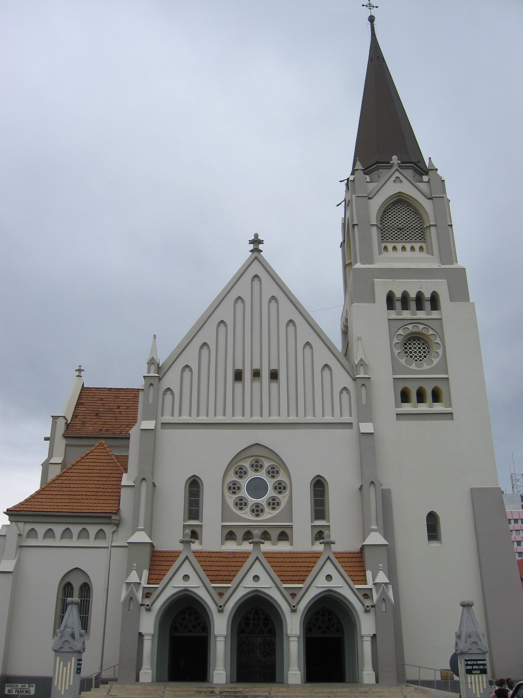 Cattedrale cattolica di St Joseph in Dar es Salaam.